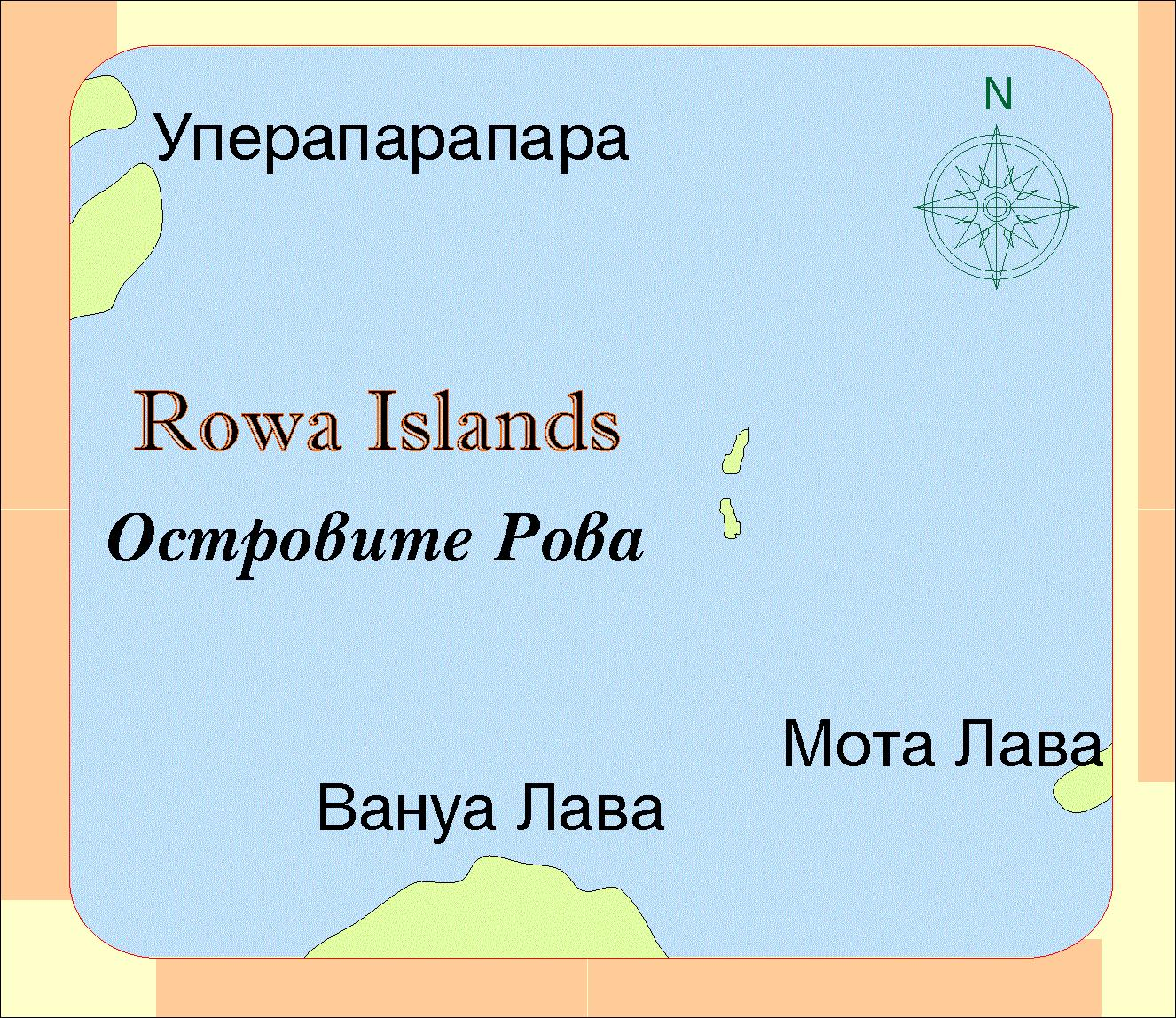 Описание: Карта на островите Рова, Република Вануату Автор: Галина Йорданова Summary: Map of Rowa Islands in Vanuatu